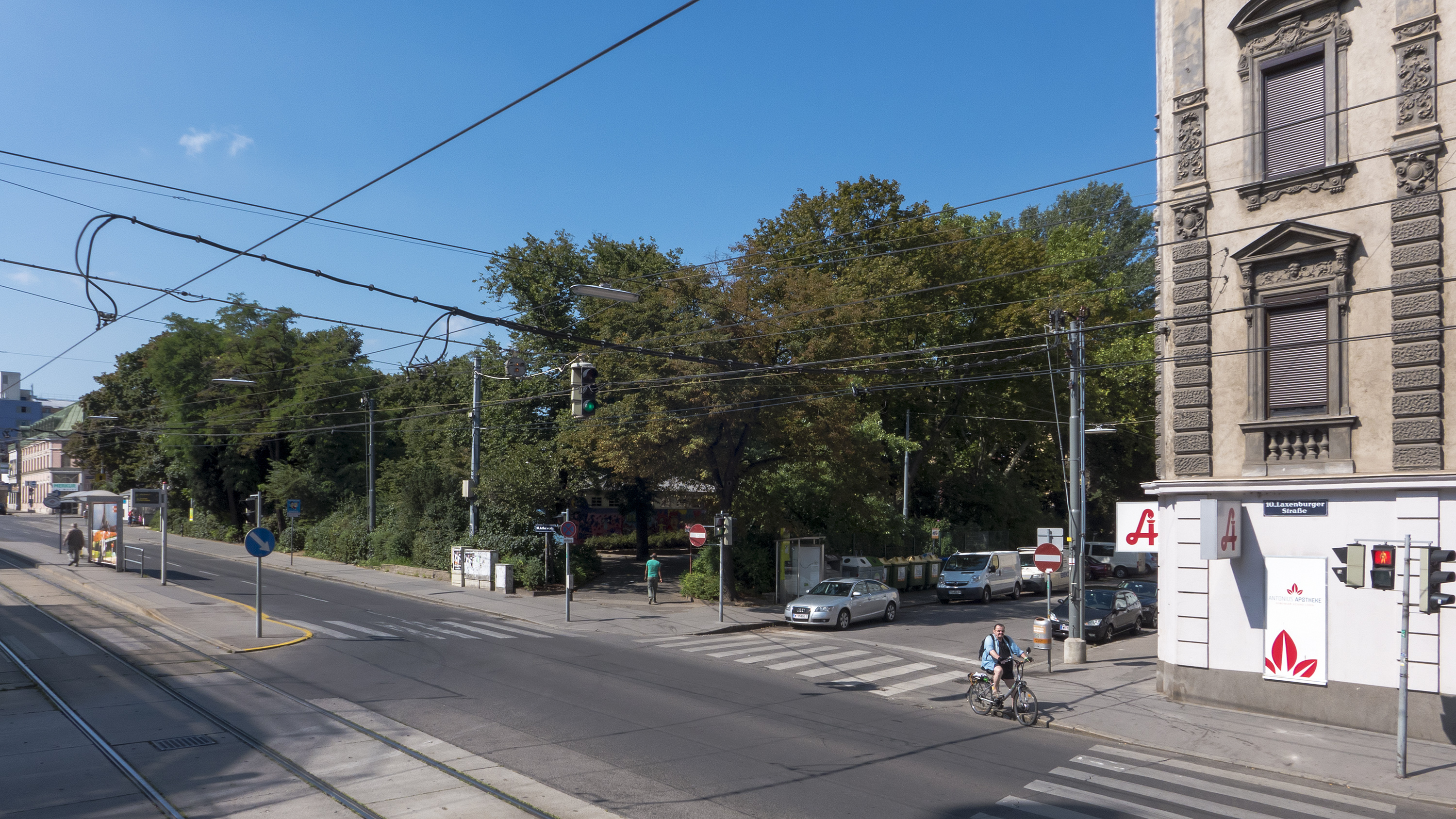 Arthaberplatz in Wien 10